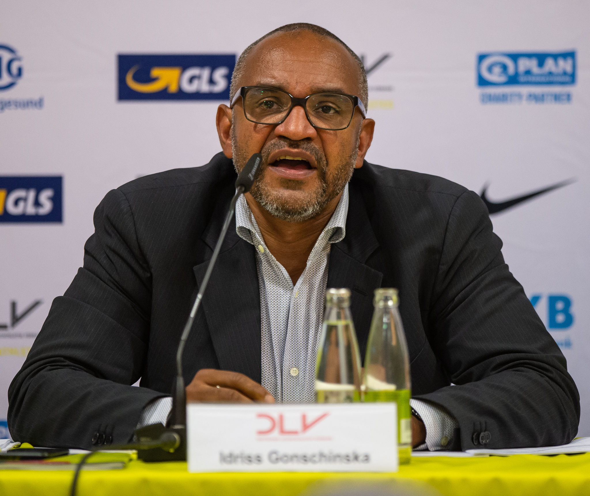 Cheick-Idriss Gonschinska,DLV,Deutsche Leichtathletik Meisterschaften 2018,Deutscher Leichtathletik-Verband,Max-Morlock-Stadion,Pressekonferenz